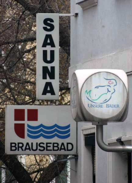 Schilder an Volksbad Einsiedlerplatz in Wien